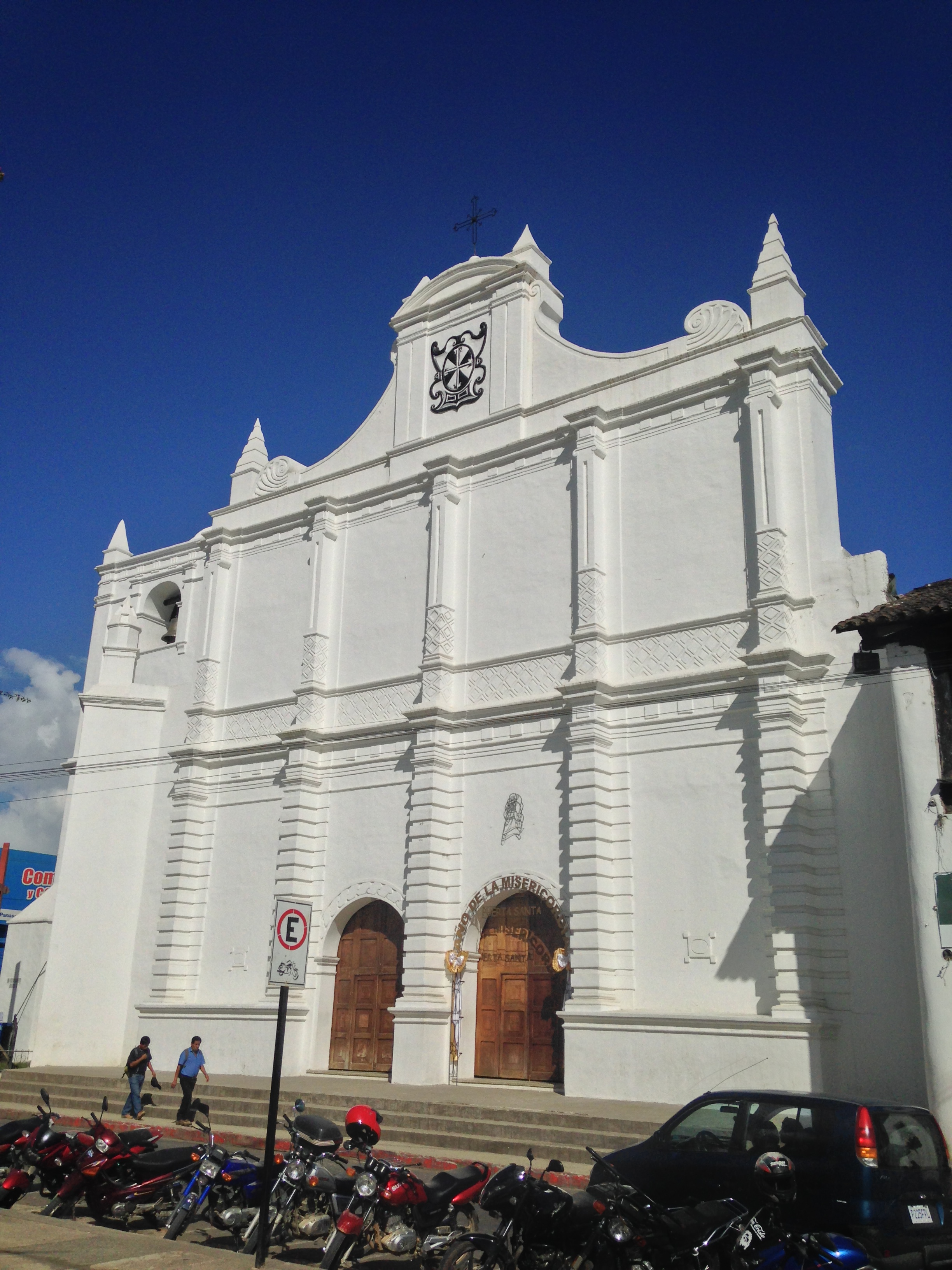 Catedral de Cobán en diciembre de 2015.